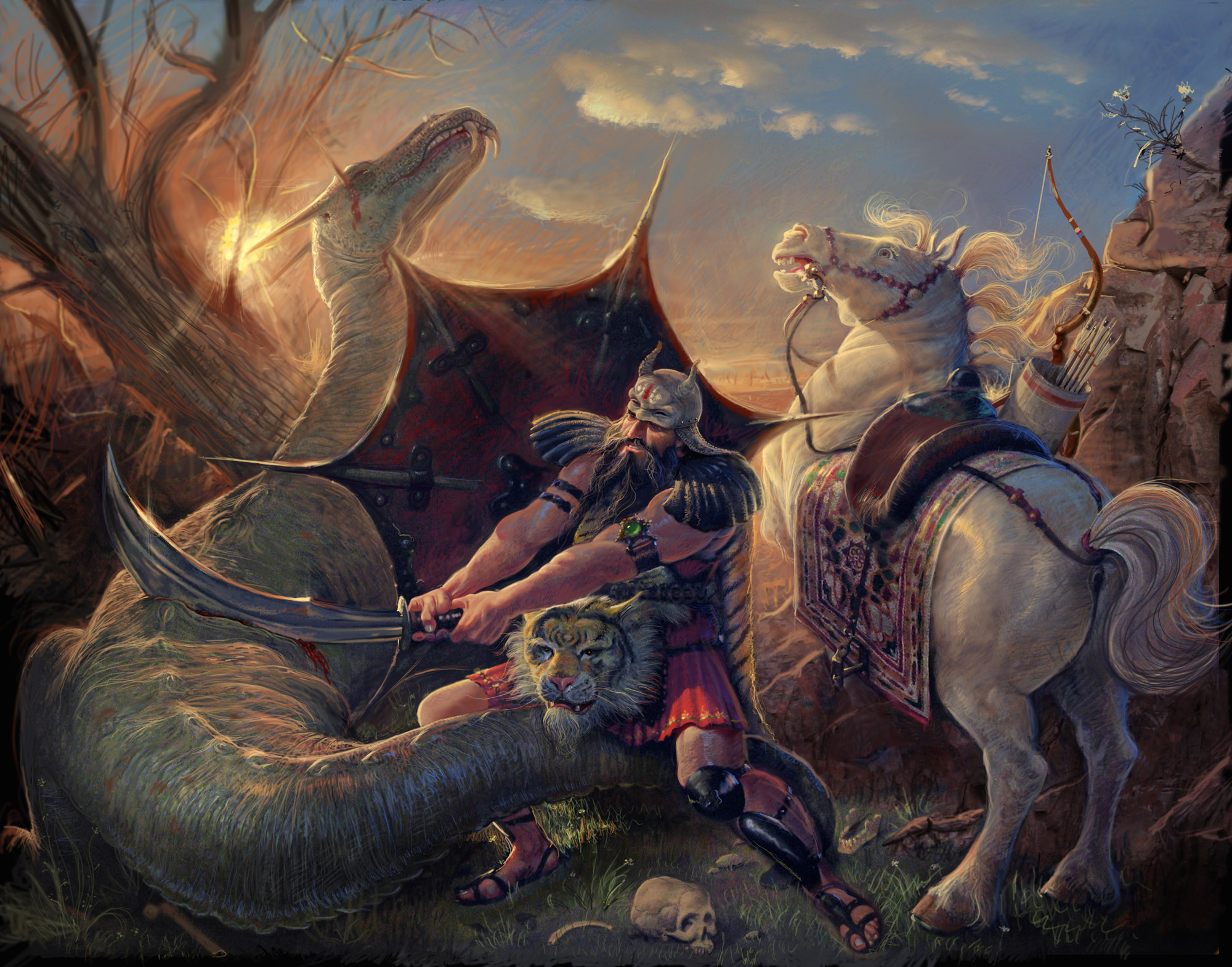 Rostam